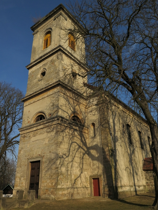 Kostel Nanebevzetí Panny Marie, Pavlovice (Jestřebí).